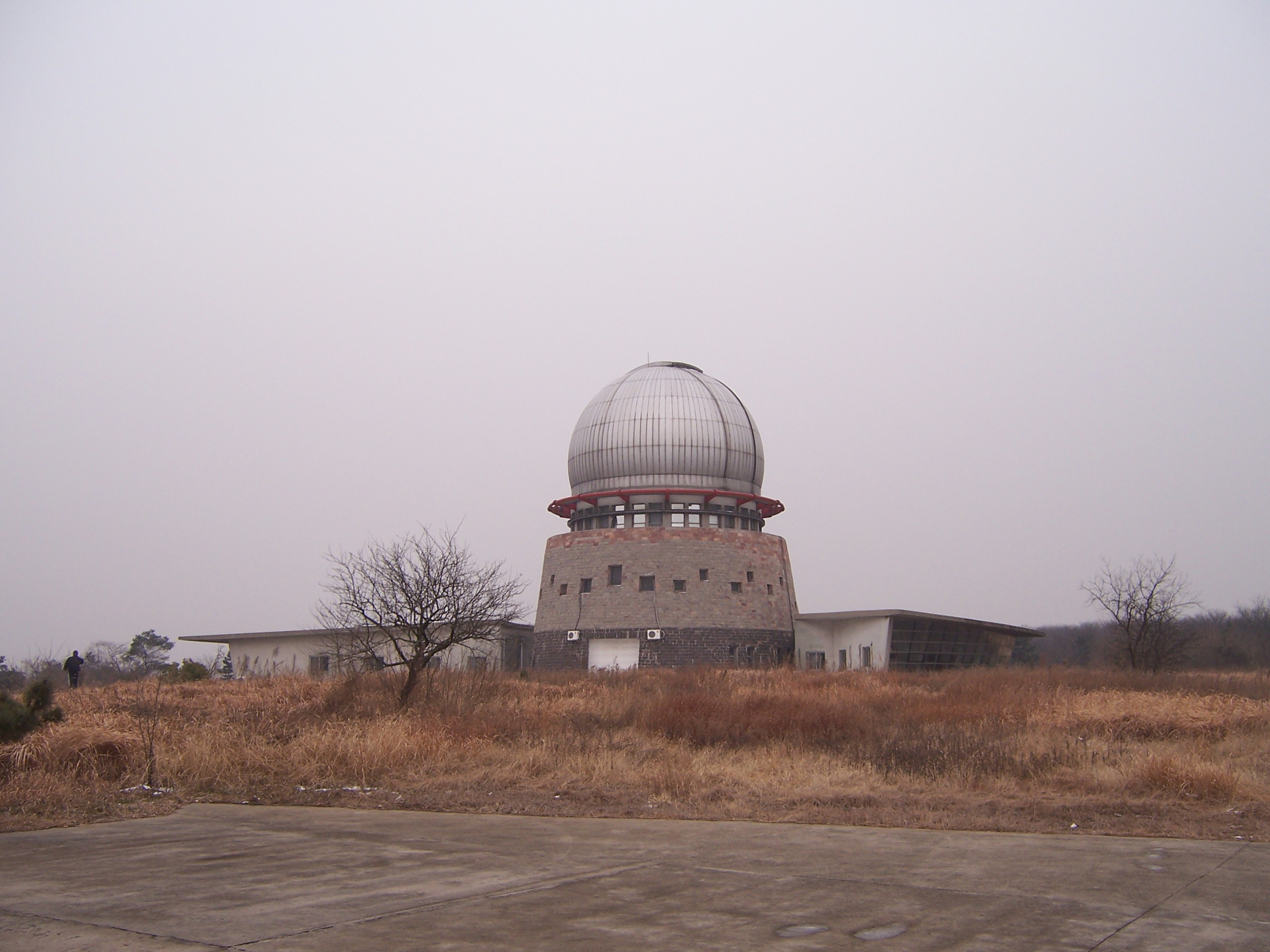 观测楼